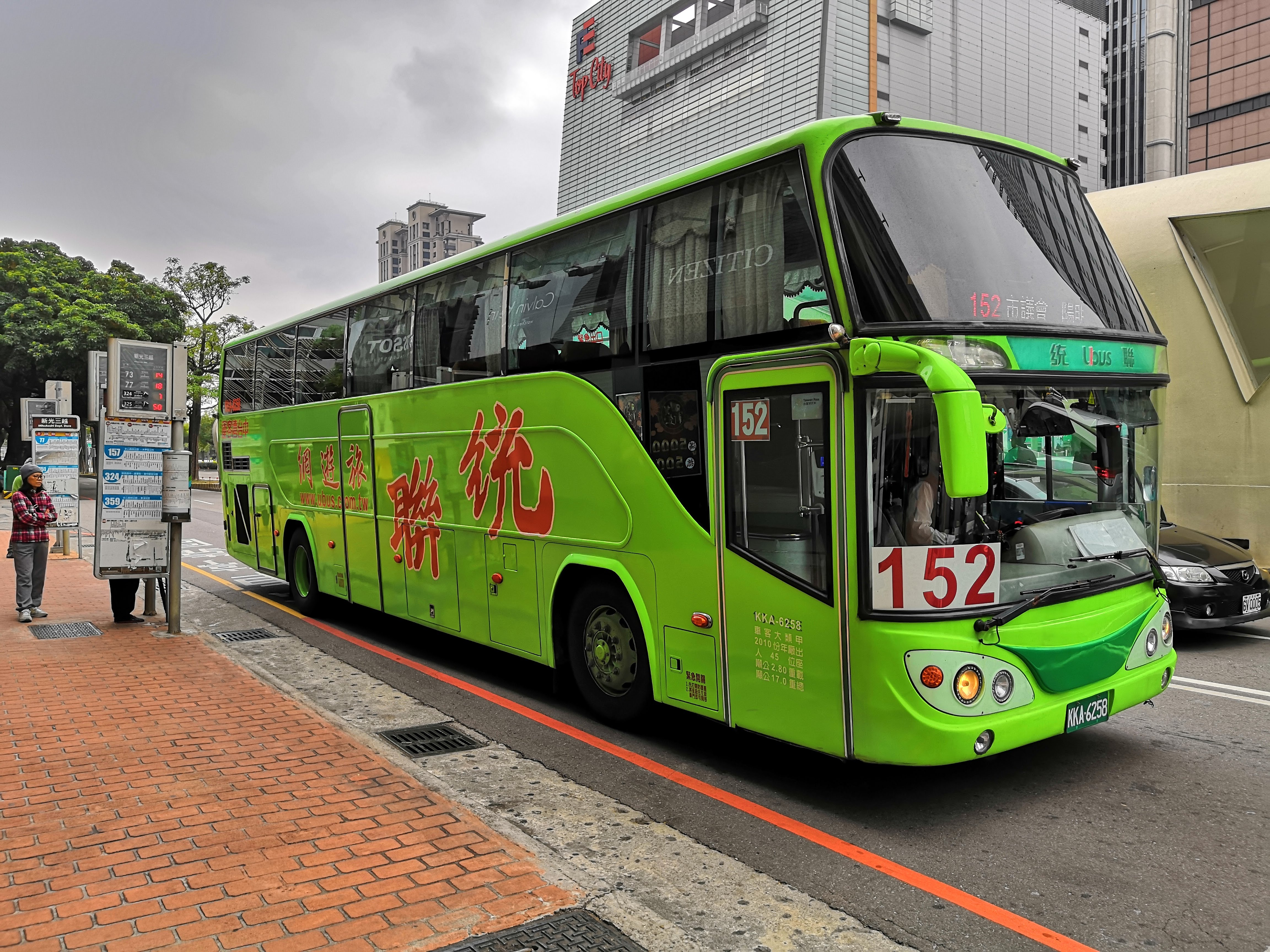 統聯客運台中市公車152路 大客車KKA6258